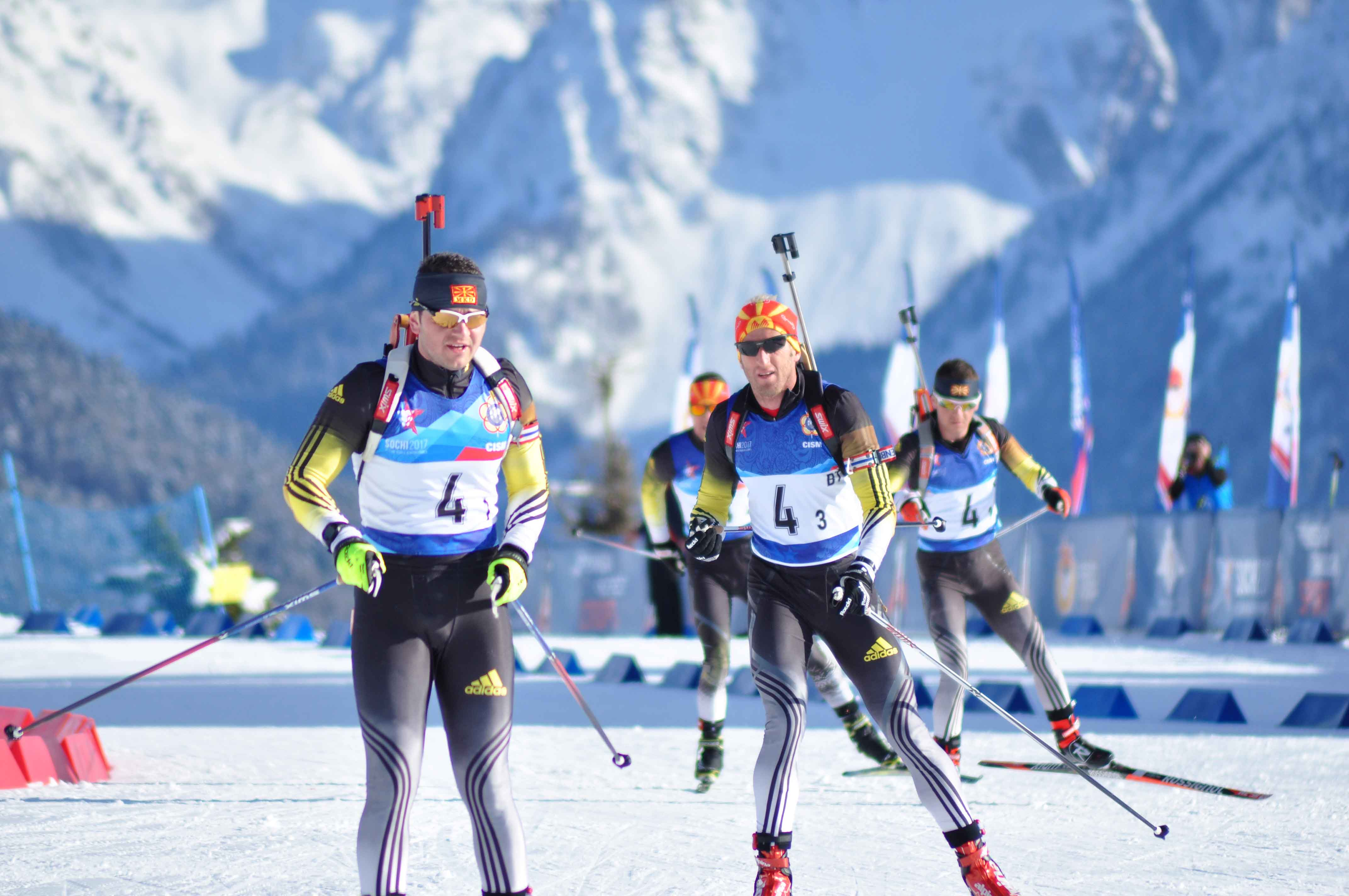 третьи зимние Всемирные военные игры, разное